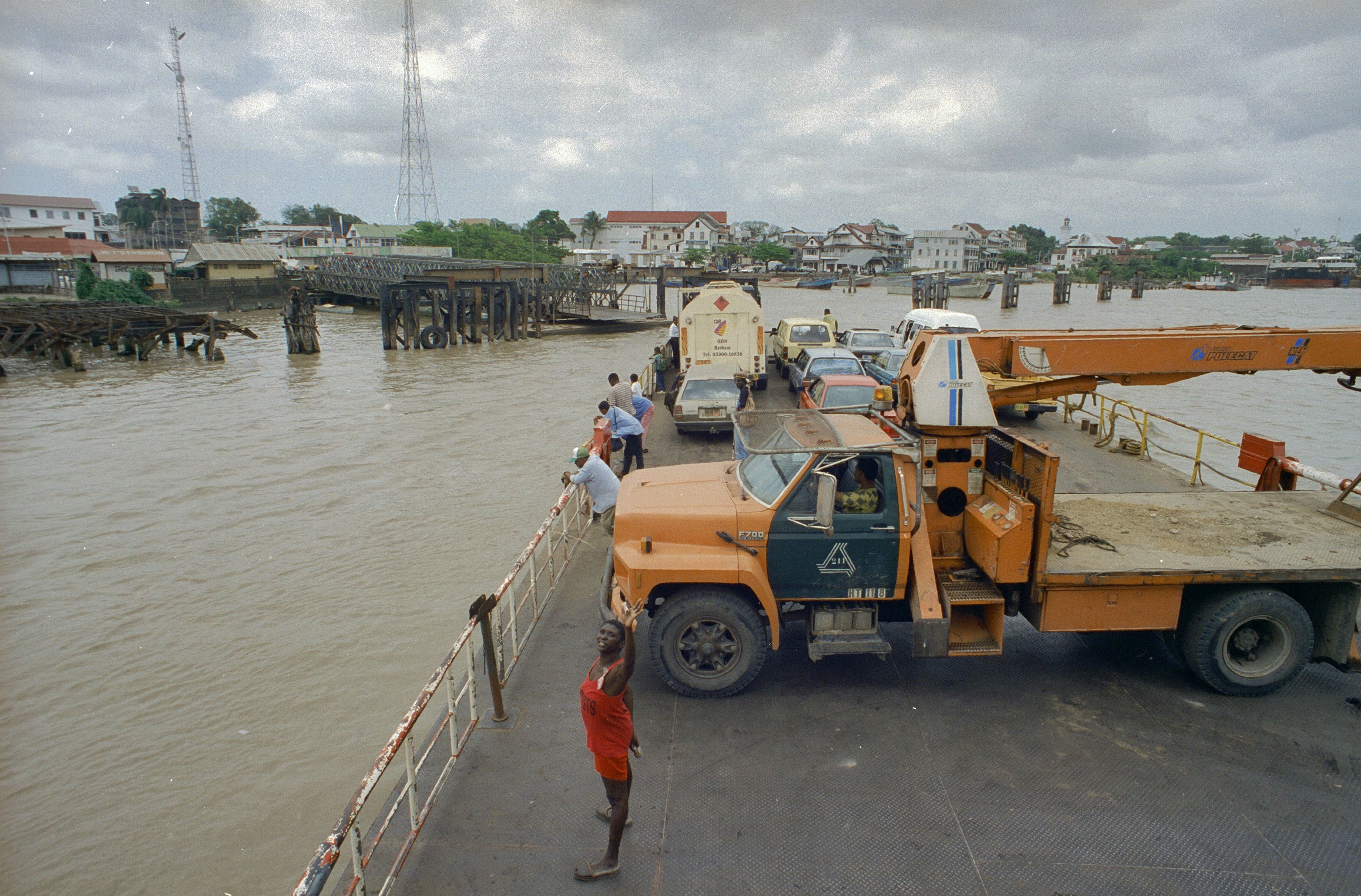 Koloniale geschiedenis/ Veerpont: Zicht op veerboot tussen Paramaribo en Meerzorg v.v. (opmerking: Suriname reis Loek Tangel)